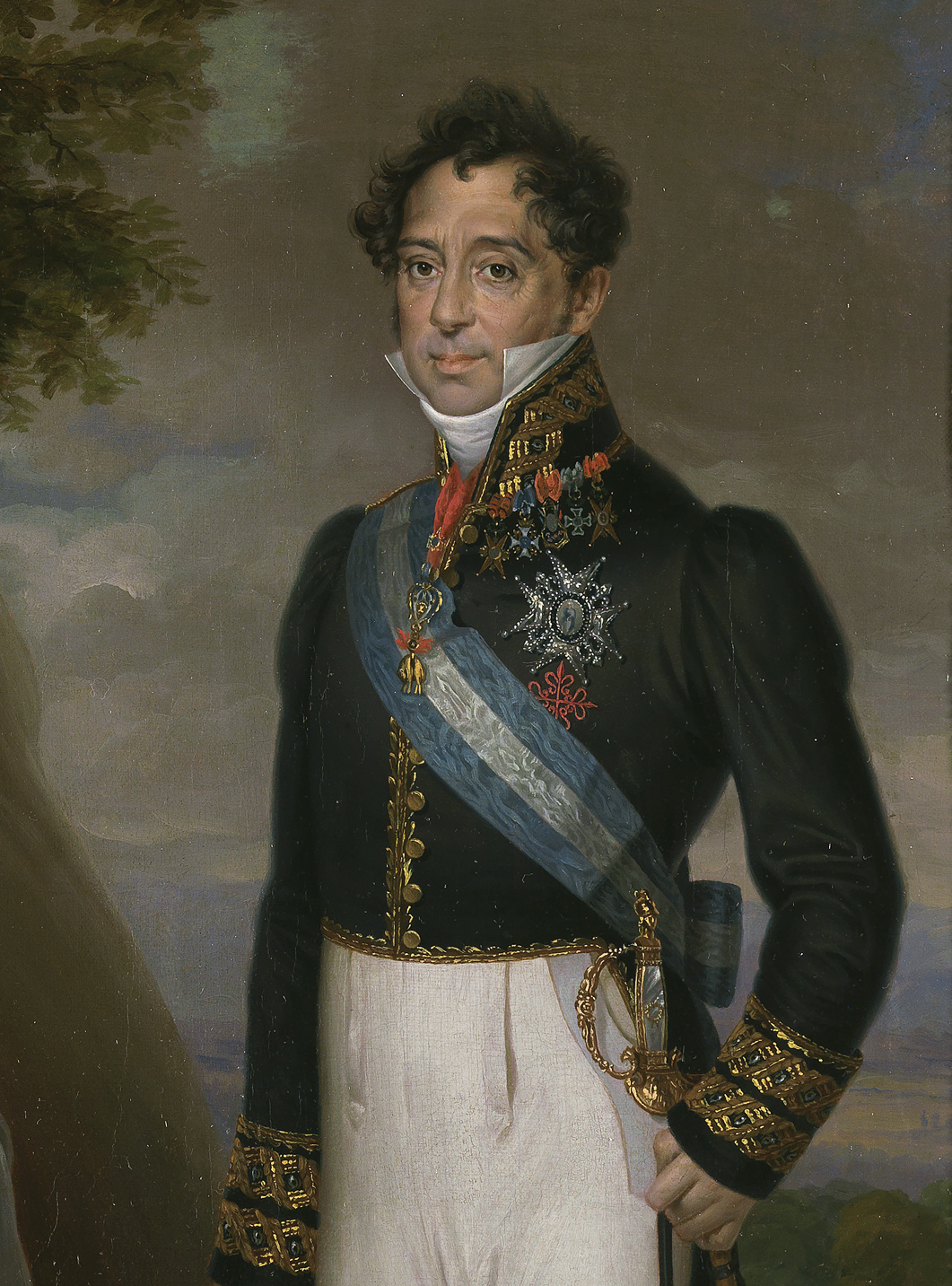 Joaquín José Melgarejo y Saurín (1780-1835), duque de San Fernando de Quiroga, marqués de Melgarejo, señor del castillo de Larache, de Cox, de La Condomina y de La Granja, Brigadier de los Reales Ejércitos, caballero de la Orden del Toisón de Oro, caballero de la Orden de Calatrava (1815), y caballero gran cruz de la Orden de Carlos III.